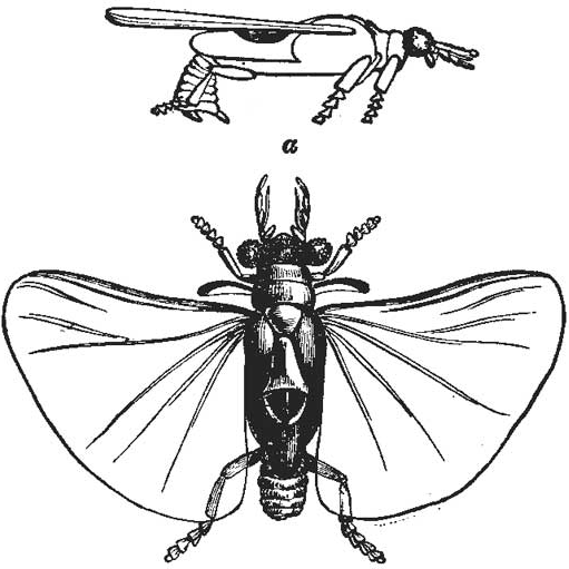 Stylops childreni, самец